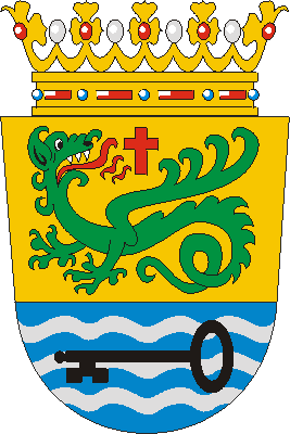 Escudo de Puerto de la Cruz (Santa Cruz de Tenerife, España)